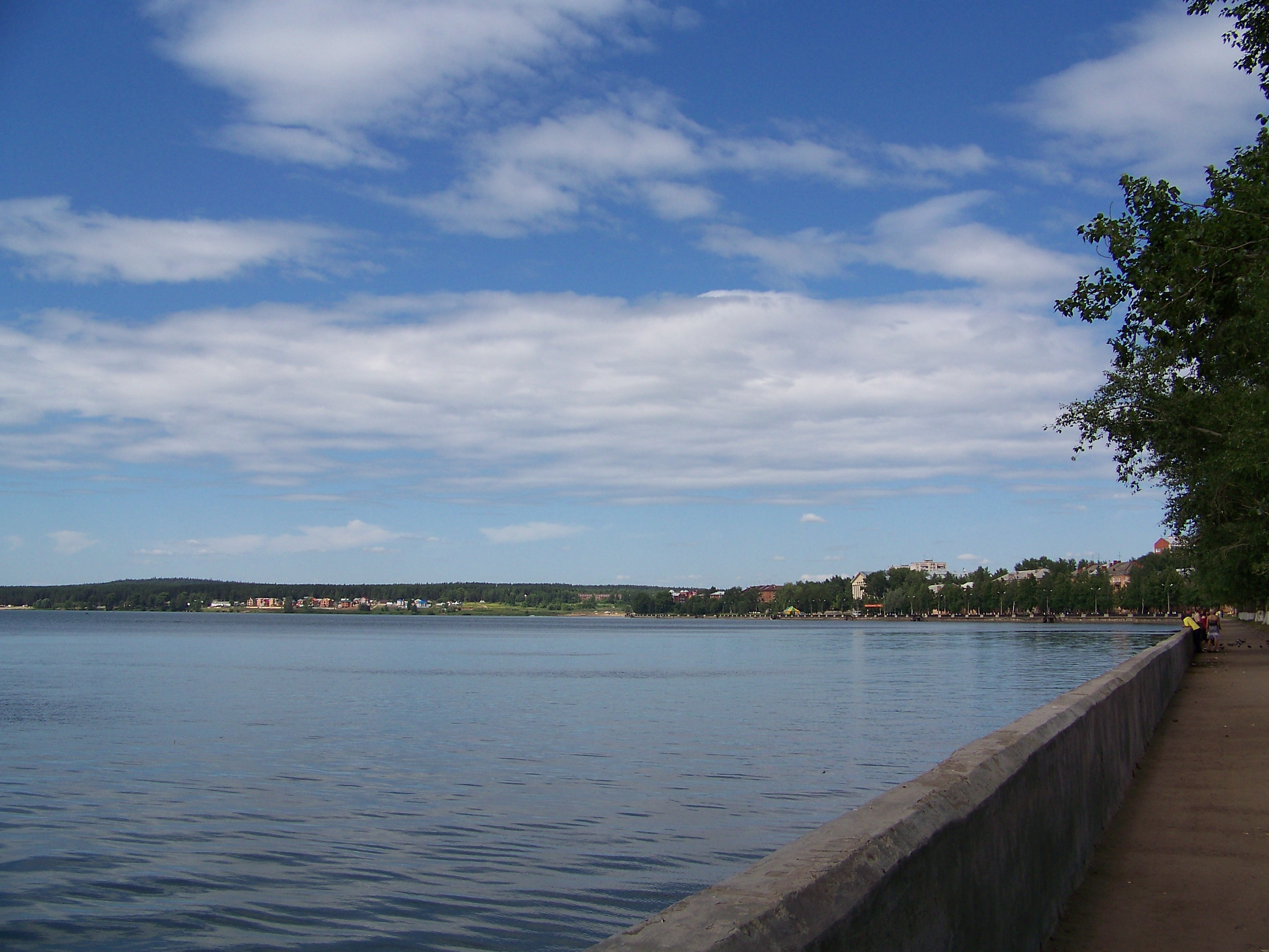 Воткинск